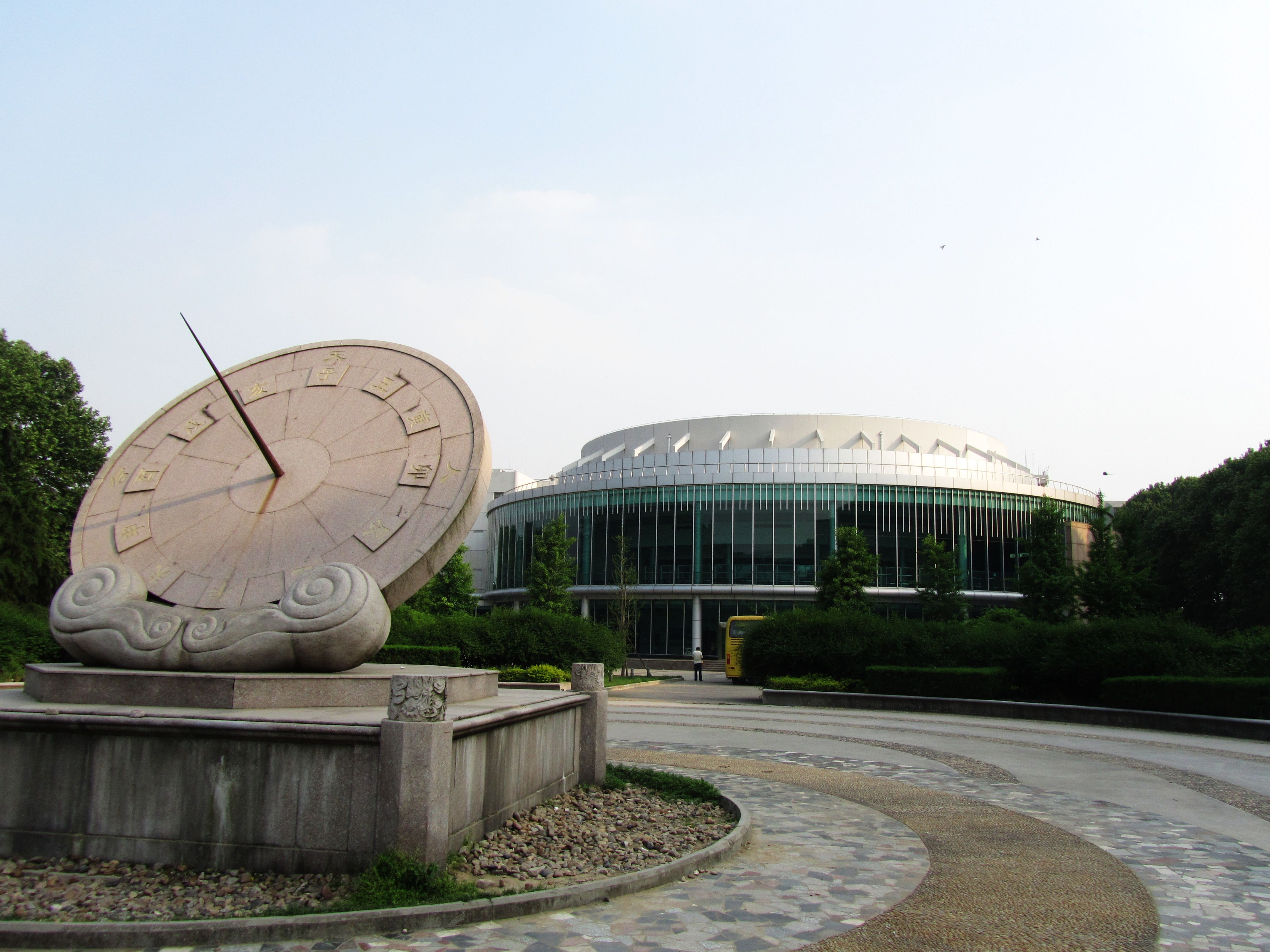 南京理工大学时间广场。